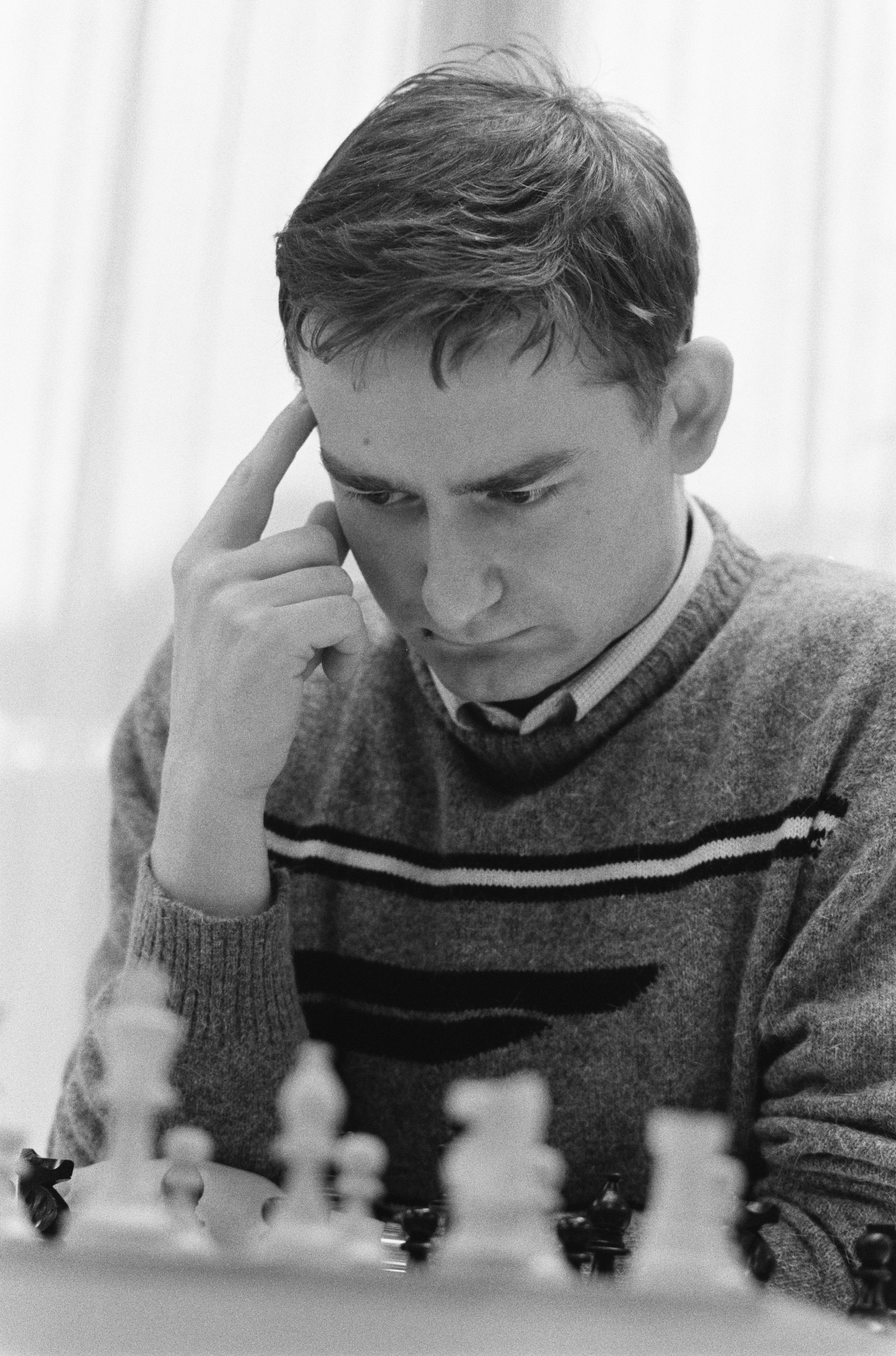 Collectie / Archief : Fotocollectie Anefo Reportage / Serie : Euwe Schaakvierkamp Beschrijving : Valeri Salov Datum : 16 maart 1989 Trefwoorden : schaken, vierkampen Persoonsnaam : Salov, V. Fotograaf : Bogaerts, Rob / Anefo Auteursrechthebbende : Nationaal Archief Materiaalsoort : Negatief (zwart/wit) Nummer archiefinventaris : bekijk toegang 2.24.01.05 Bestanddeelnummer : 934-4239